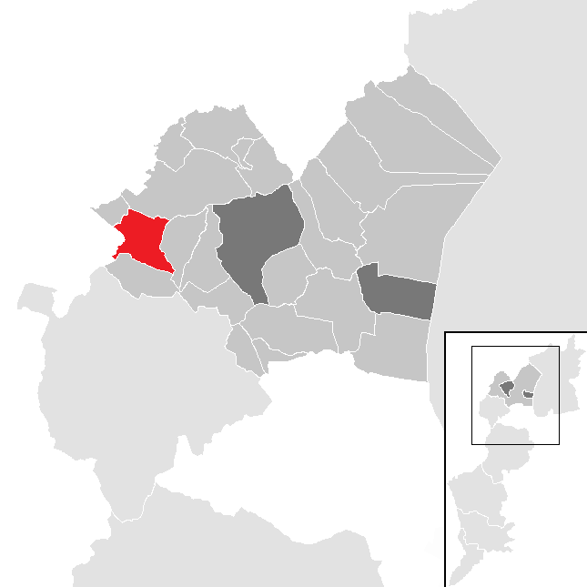 Bezirk Eisenstadt-Umgebung